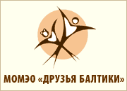 Изображение взято с айта для информирования населения.